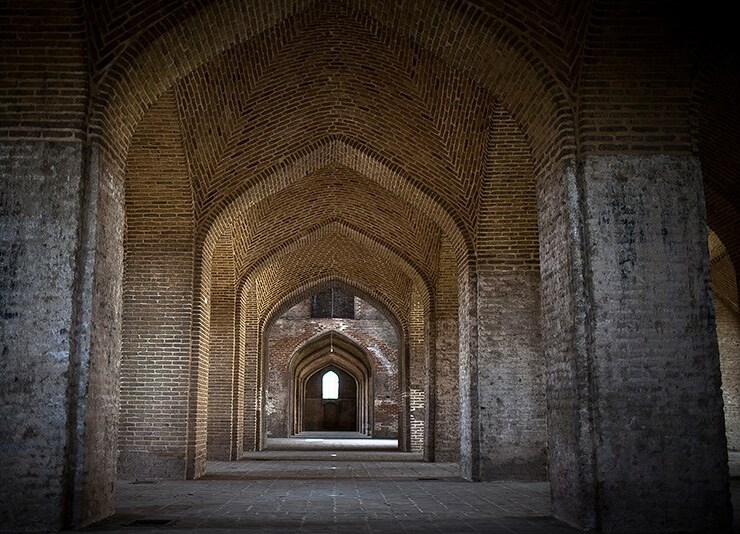 مازِرونی: فرح آباد ساری